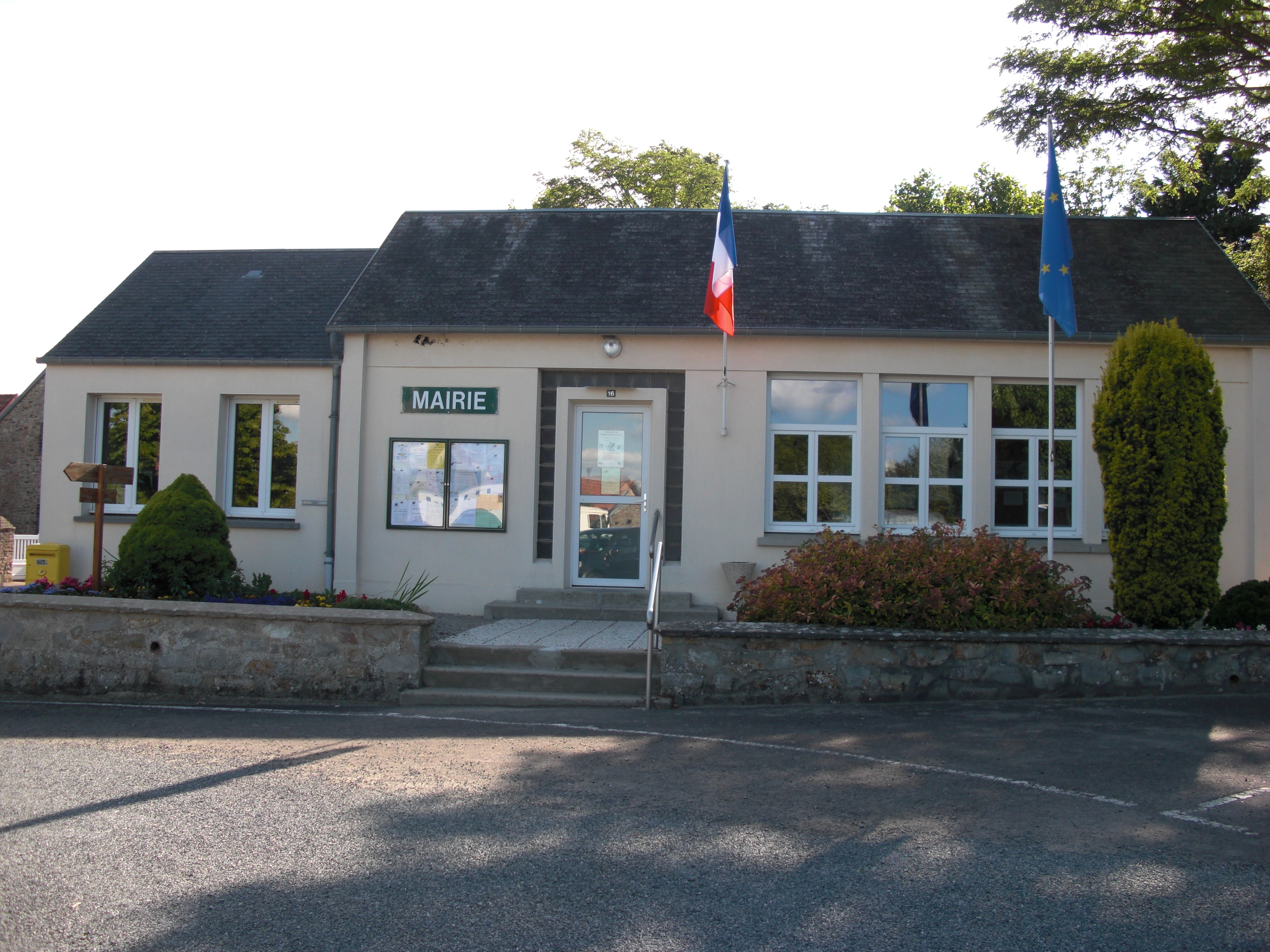 Photographie prise juin 2011 de la mairie de saint germain sur ay